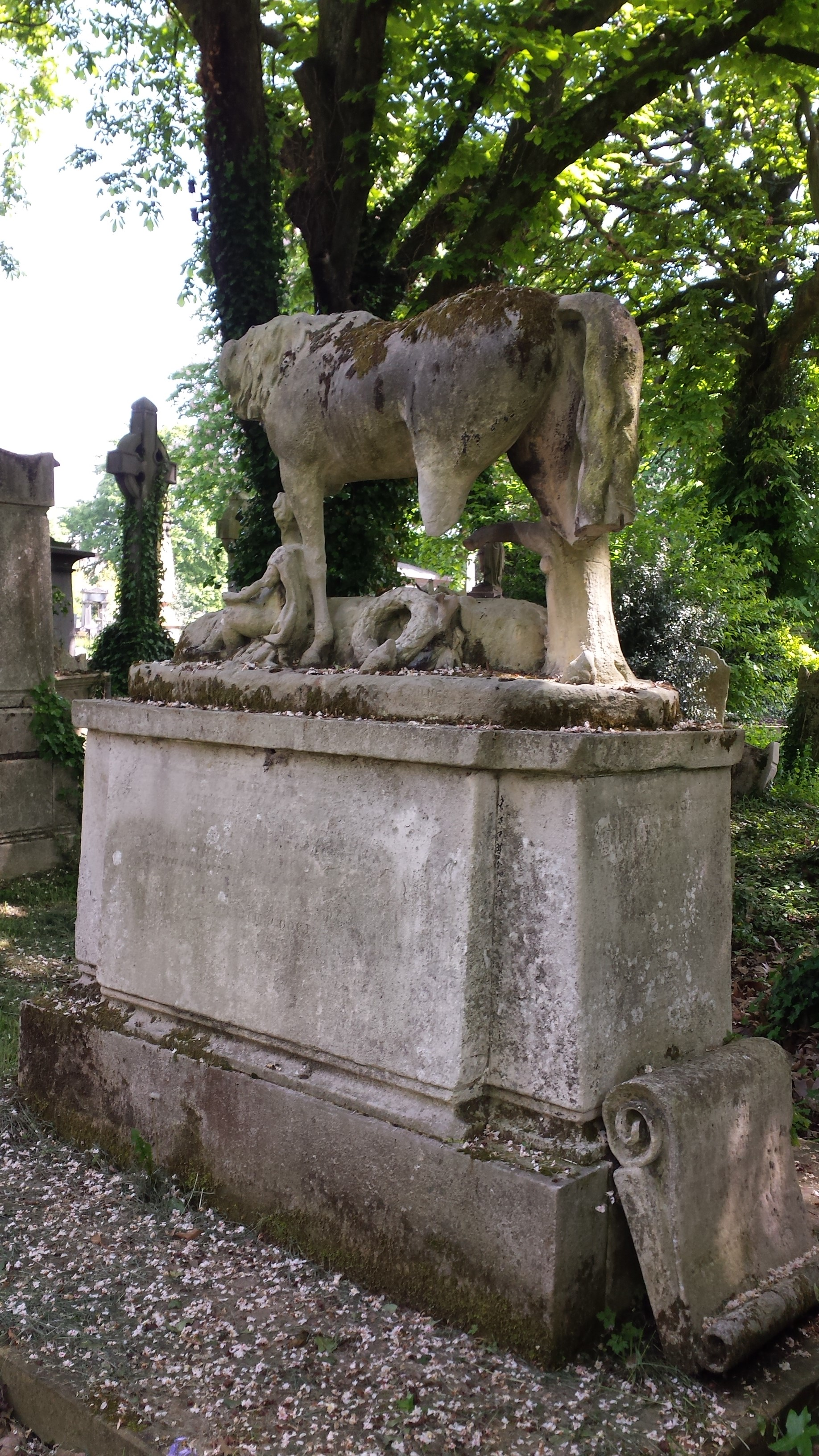 Grab der Familie Cooke, Kensal Green Cemetery